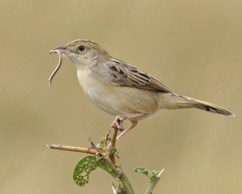 Desert Cisticola Cisticola aridulus ssp Cisticola aridulus tanganyika Masai Mara, Kenya 29th. August 2008 Swahili: Kidenenda-jangwa Habitat: Distribution: 690V1349